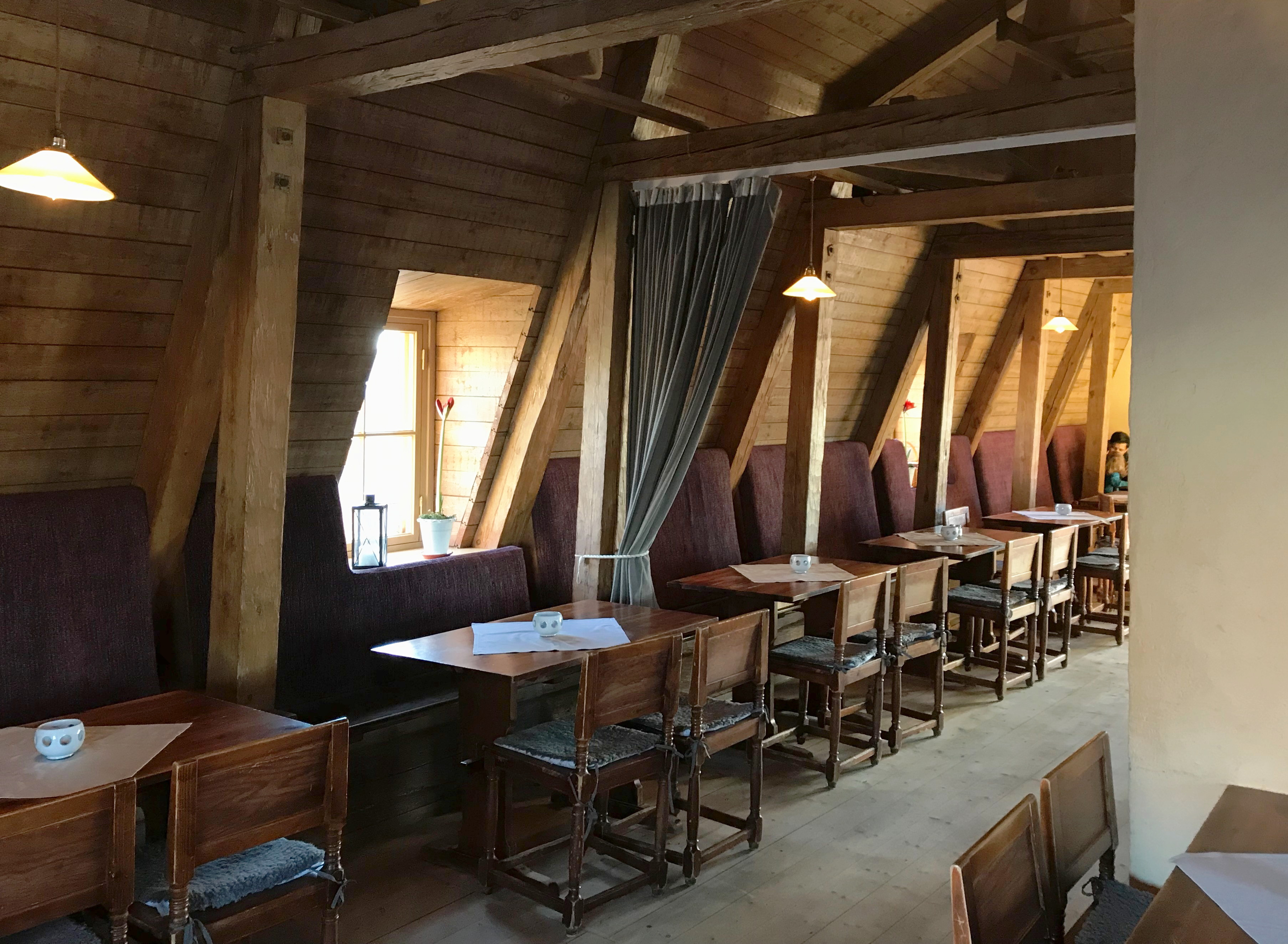 Skansen